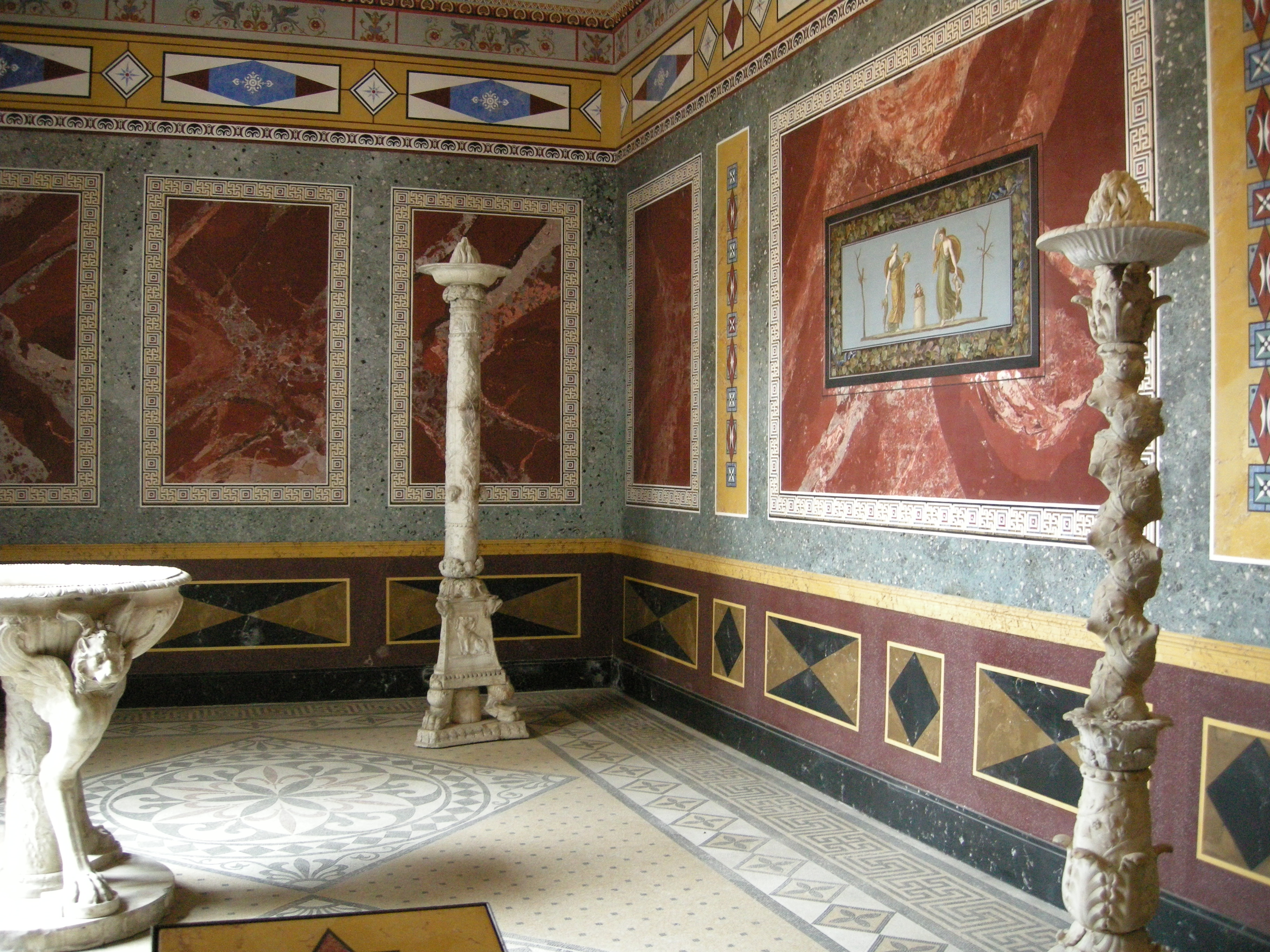 sommerliches Speisezimmer (triclinium) mit Zugang zum Hausgarten (viridarium), römisches Prunkbecken und Marmorkandelaber, Wände mit Stuckmarmor im Pompejanum